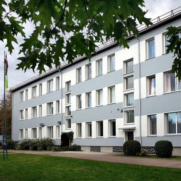 Maltas speciālās internātpamatskolas galvenā ēka Rozentovas ielā 9, Maltā, Maltas pagastā